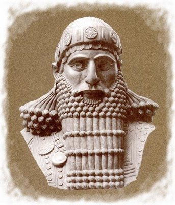 Hammu